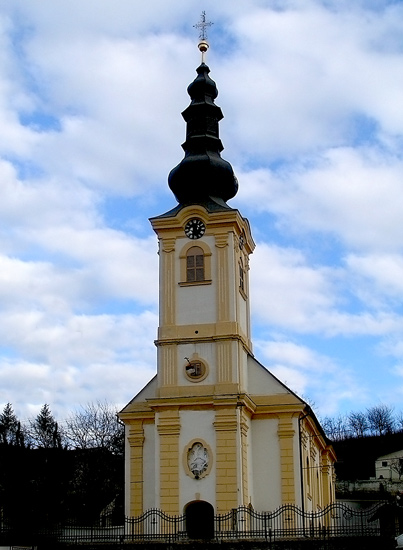 L'église orthodoxe de Beočin est située en Serbie dans la province autonome de Voïvodine